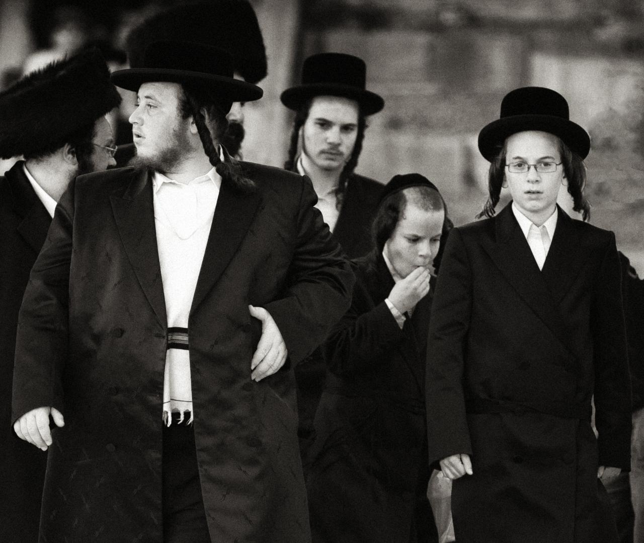 israel